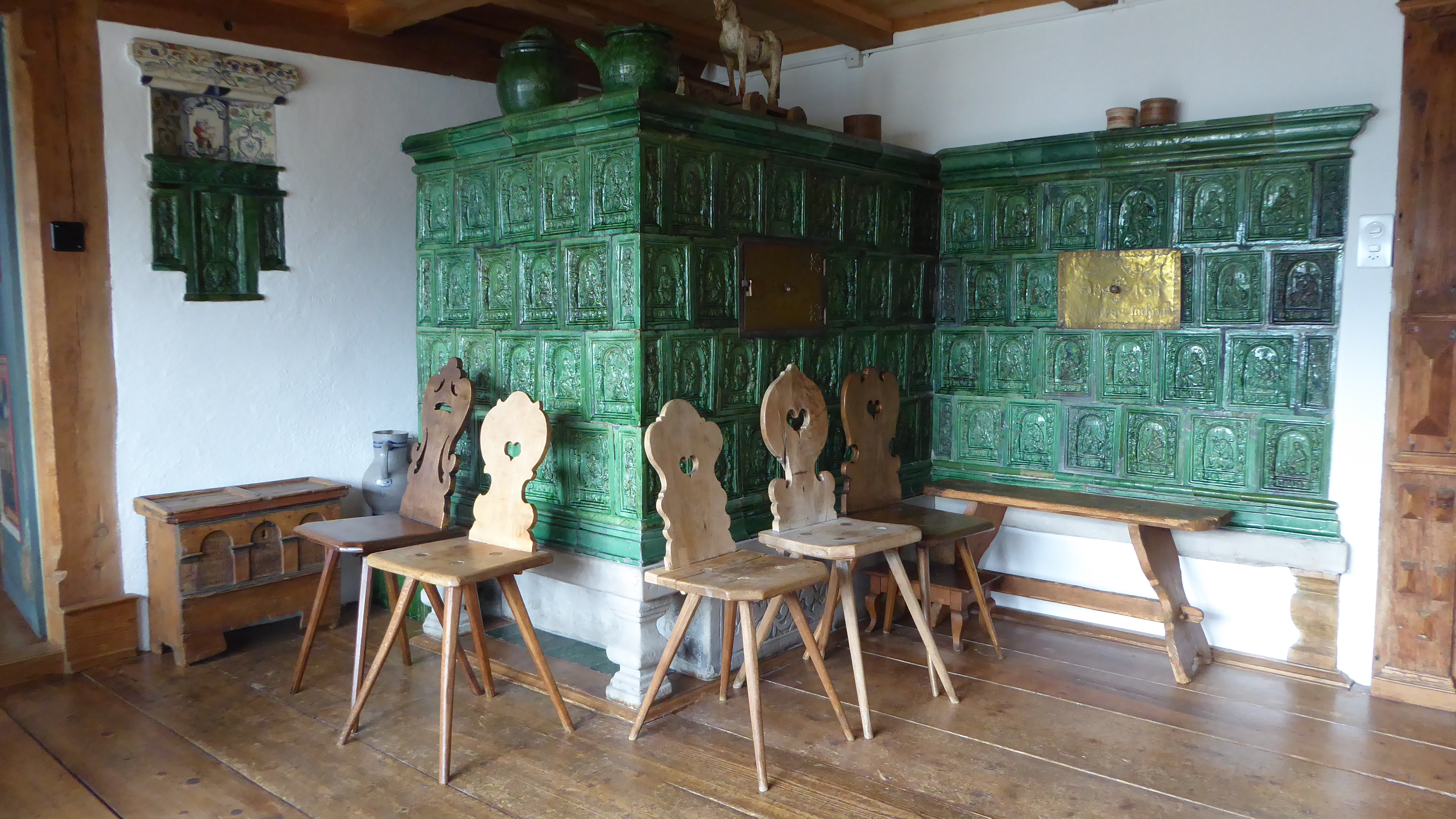 Kachelofen im Ackerhaus Ebnat-Kappel